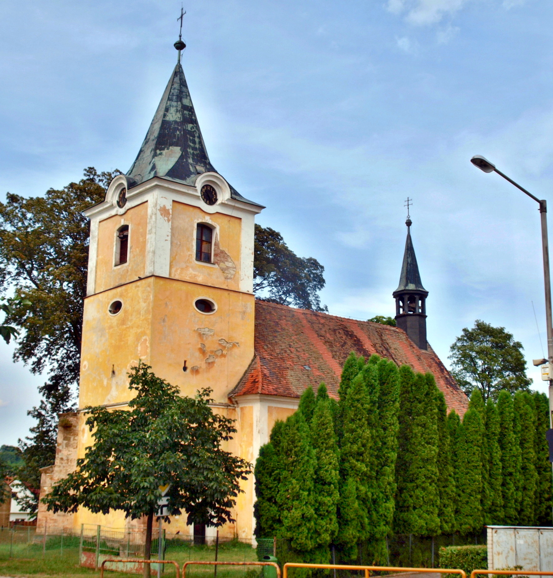 Řevničov, kostel sv. Petra a Pavla